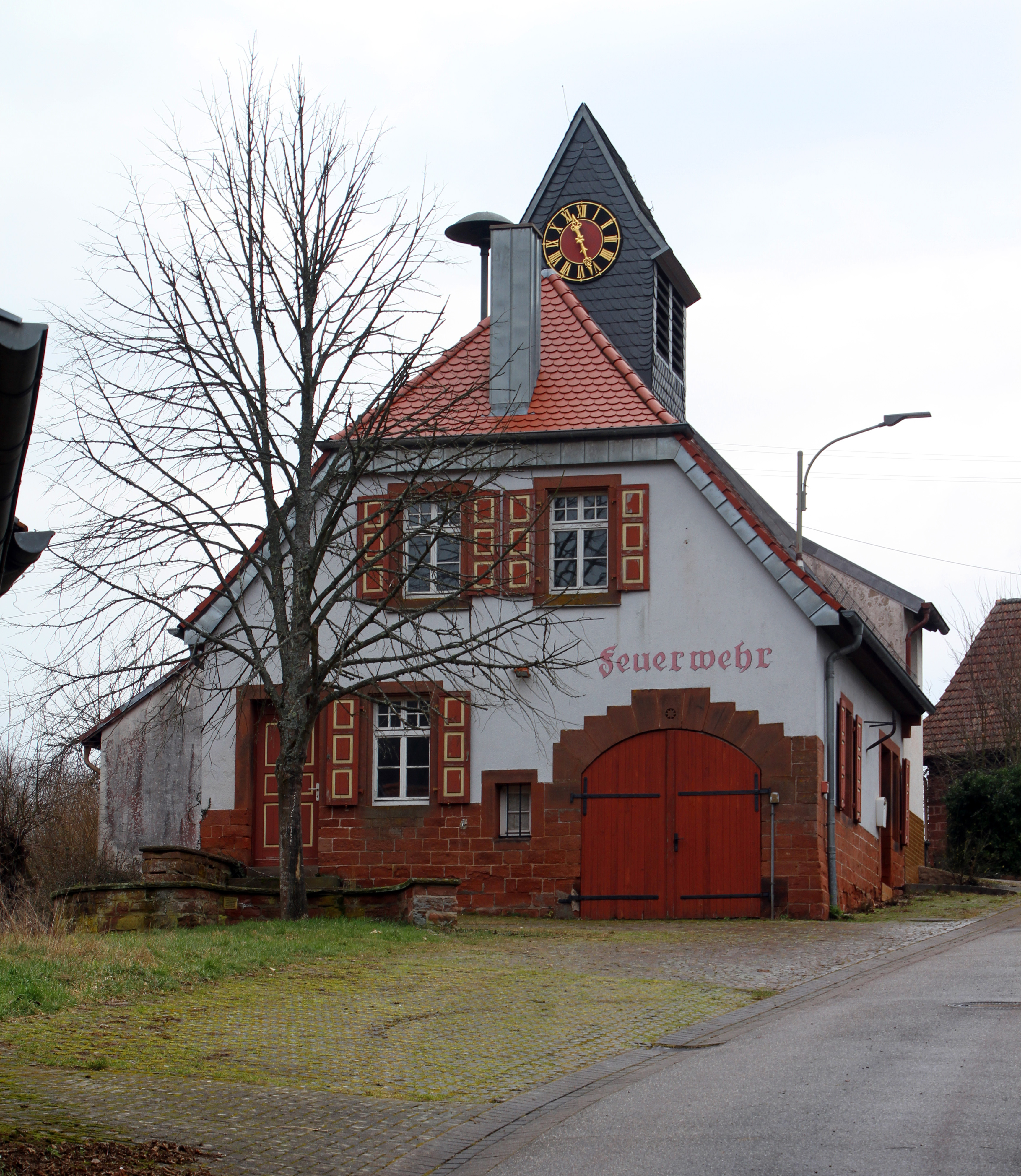 Oberschlettenbach